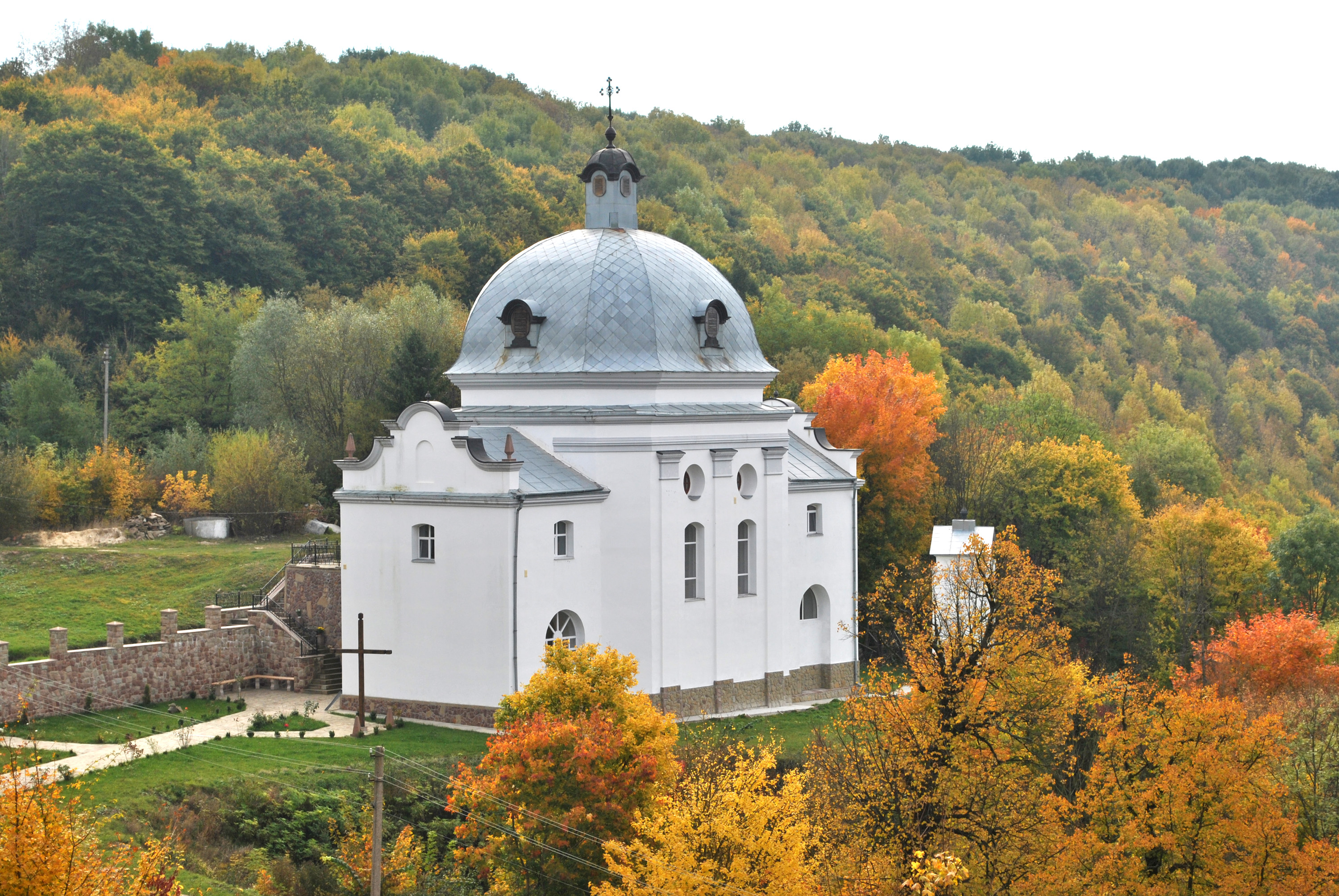 Церква монастиря Василіан (мур.) у селі Струсів Теребовлянського району Тернопільської області.